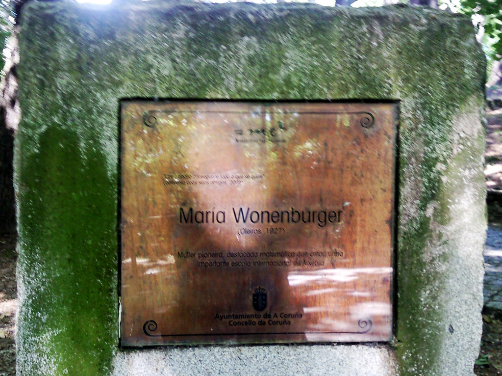 Homenaxe a María Wonderburger no parque de santa margarida da Coruña